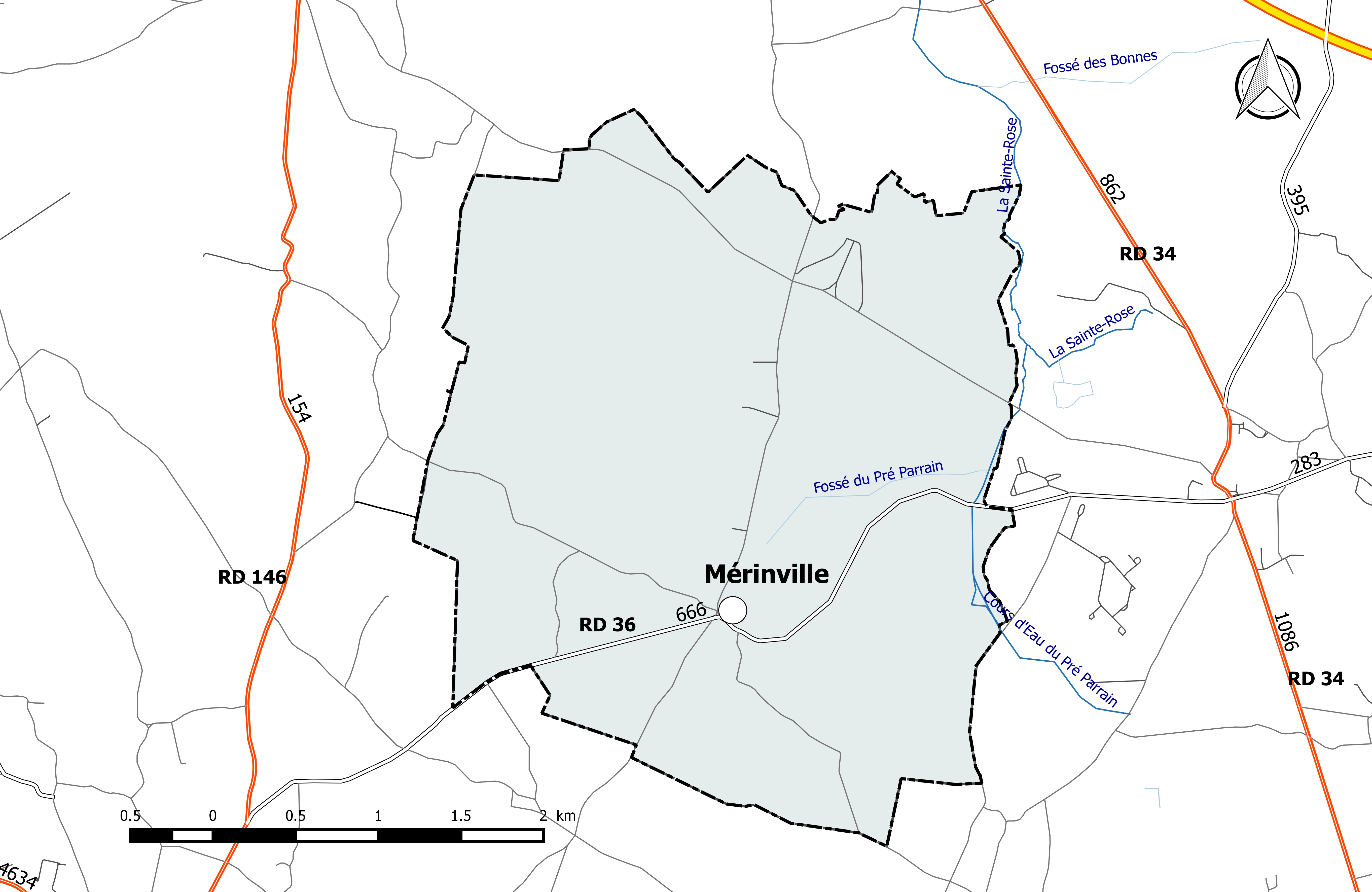 Carte du réseau routier de la commune de Mérinville.